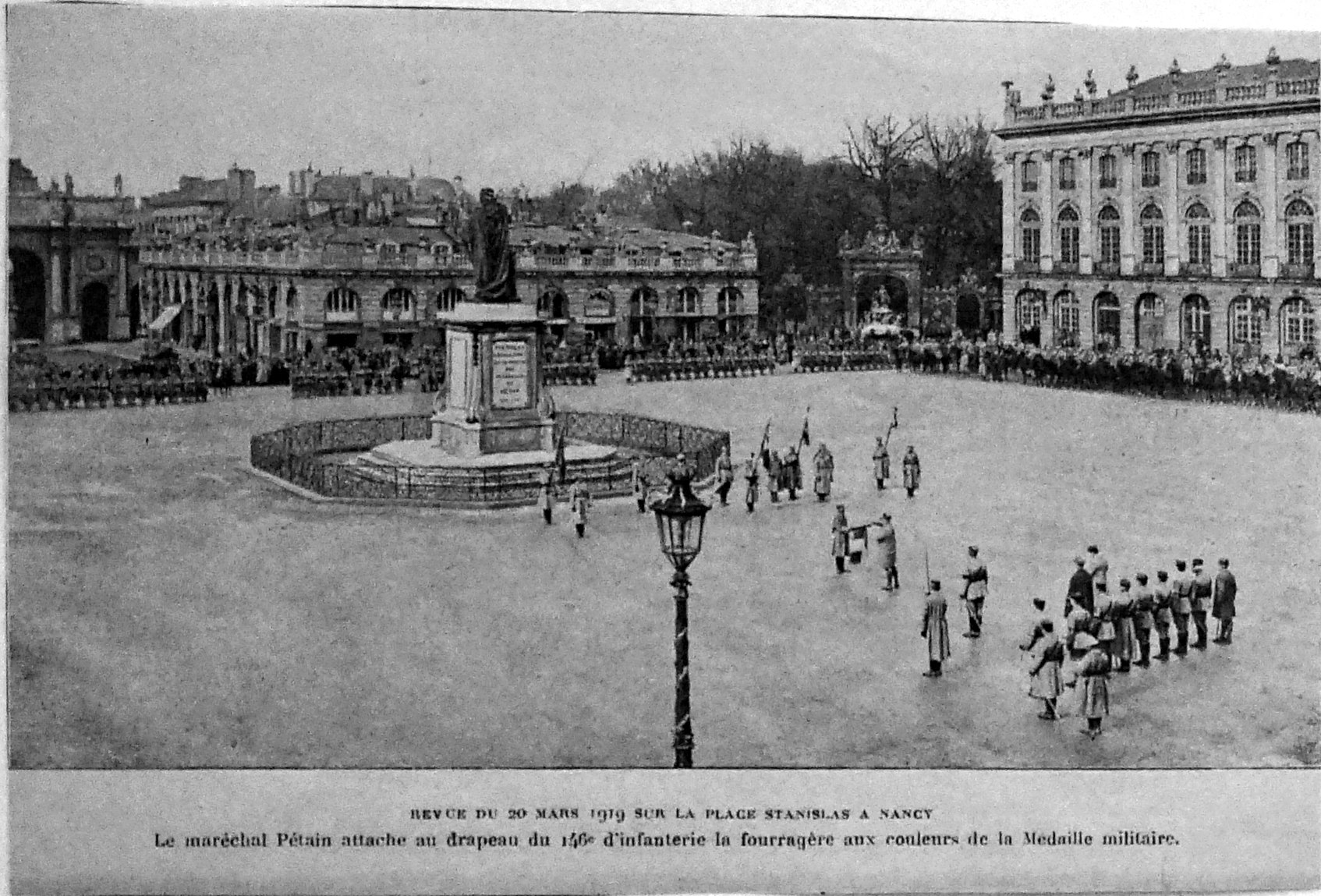 présenté au musée de Toul.